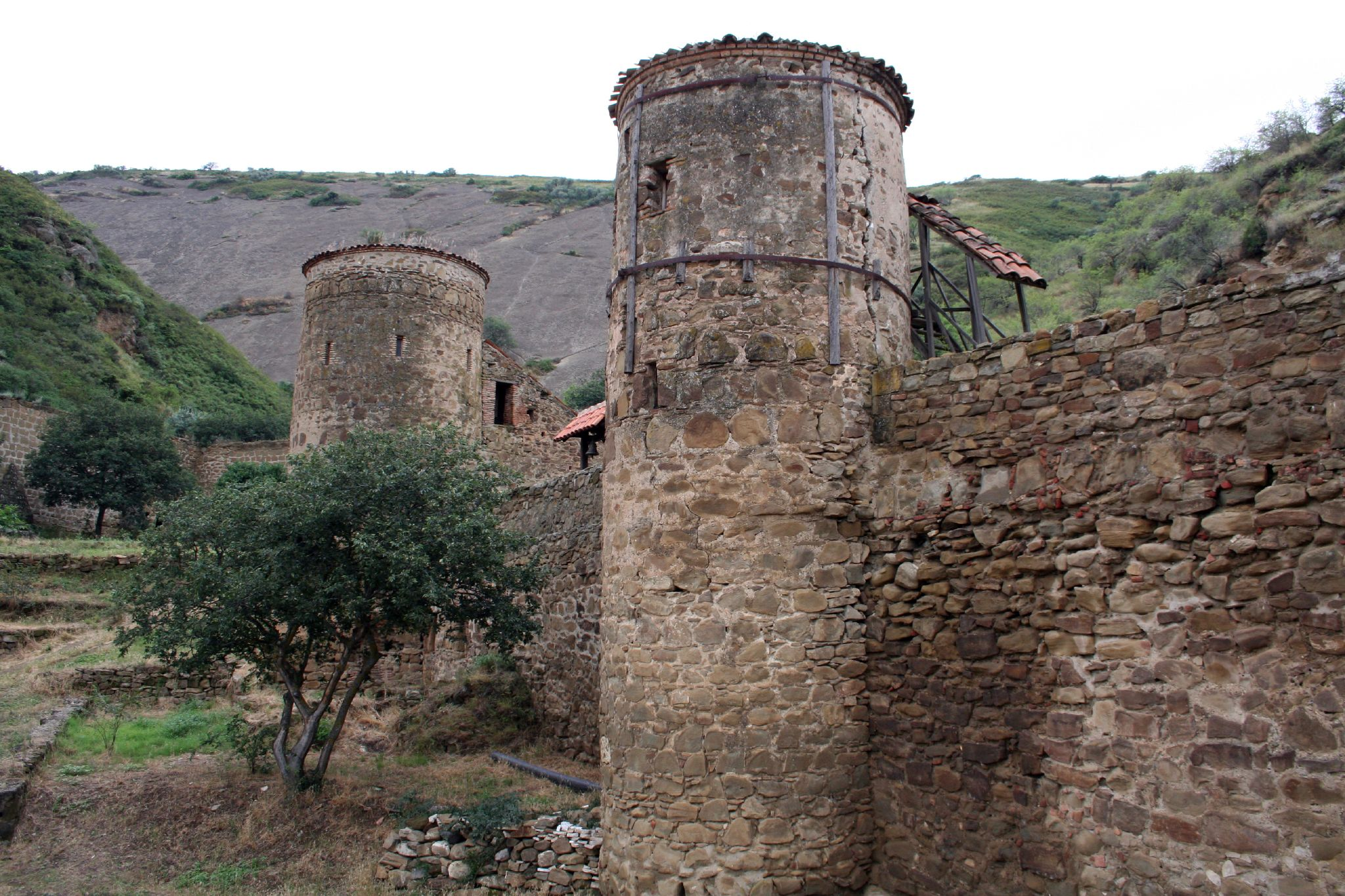 David Garedsha